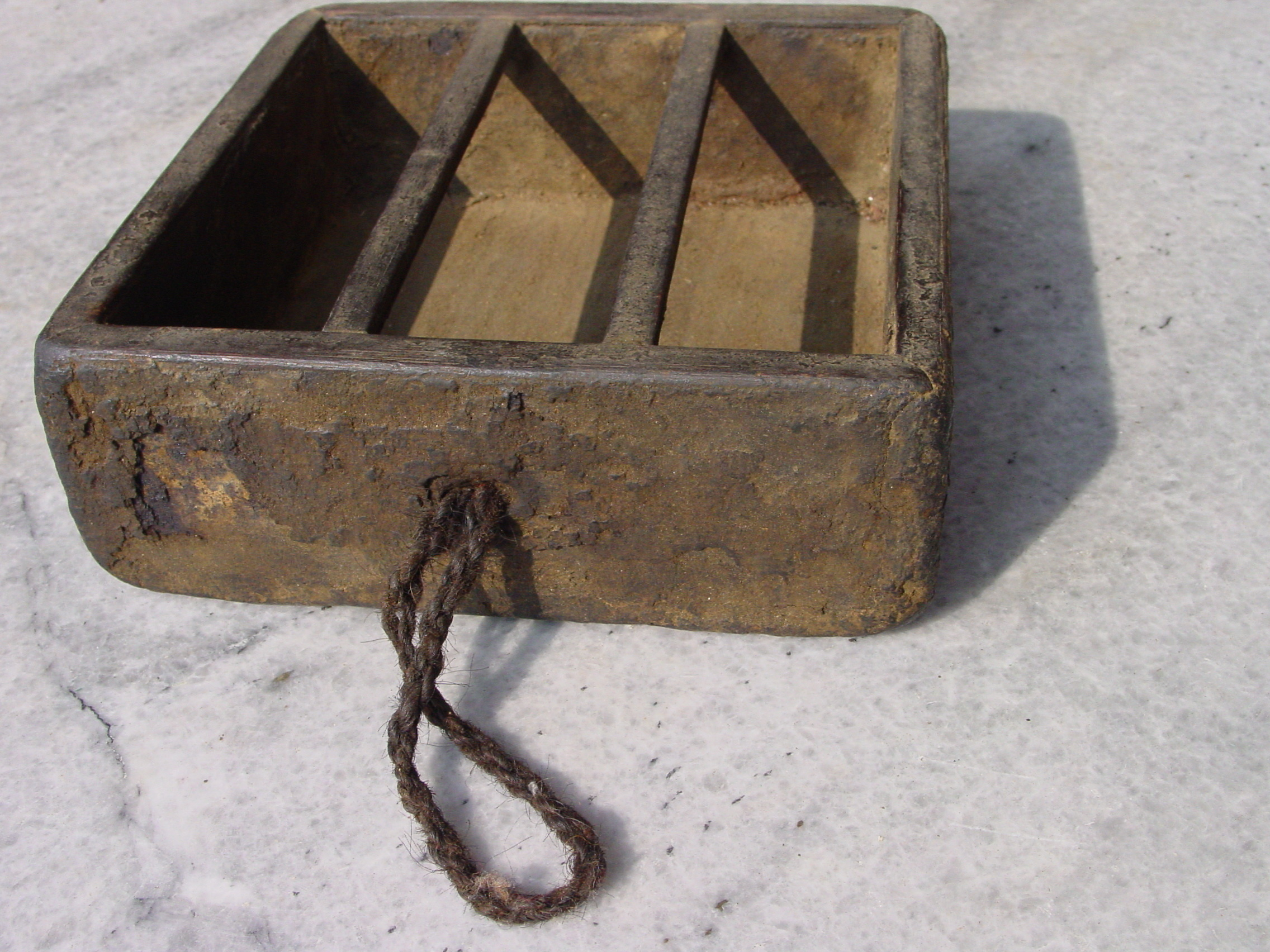 tibetisches Hohlmaß (tib.: bre) Dieses tibetische bre-Hohlmaß enthält zwei Stege, die ein übermäßiges Abstreichen des Volumens verhindern sollen. Die Maße sind: Außenmaß = 18 x 18 cm, Wandstärke = 1 x 1 cm, Innenmaß 16 x 16 cm, Tiefe = 5 cm, Bodenwand = 1 cm (= 6 cm Gesamthöhe). Breite der Stege = 0.9 cm. Das Volumen beträgt 1.280 ccm.